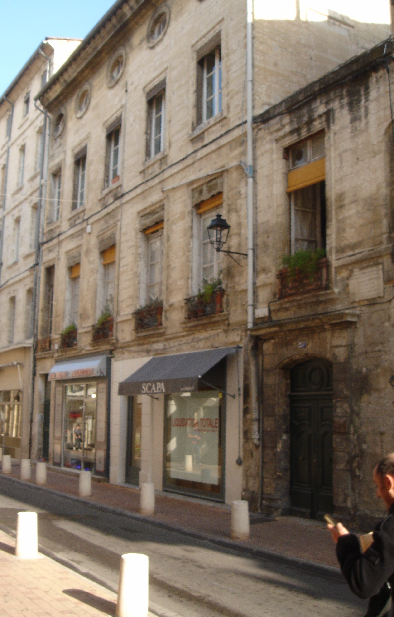 Maison Bouchet 22-23 rue Calade à Avignon